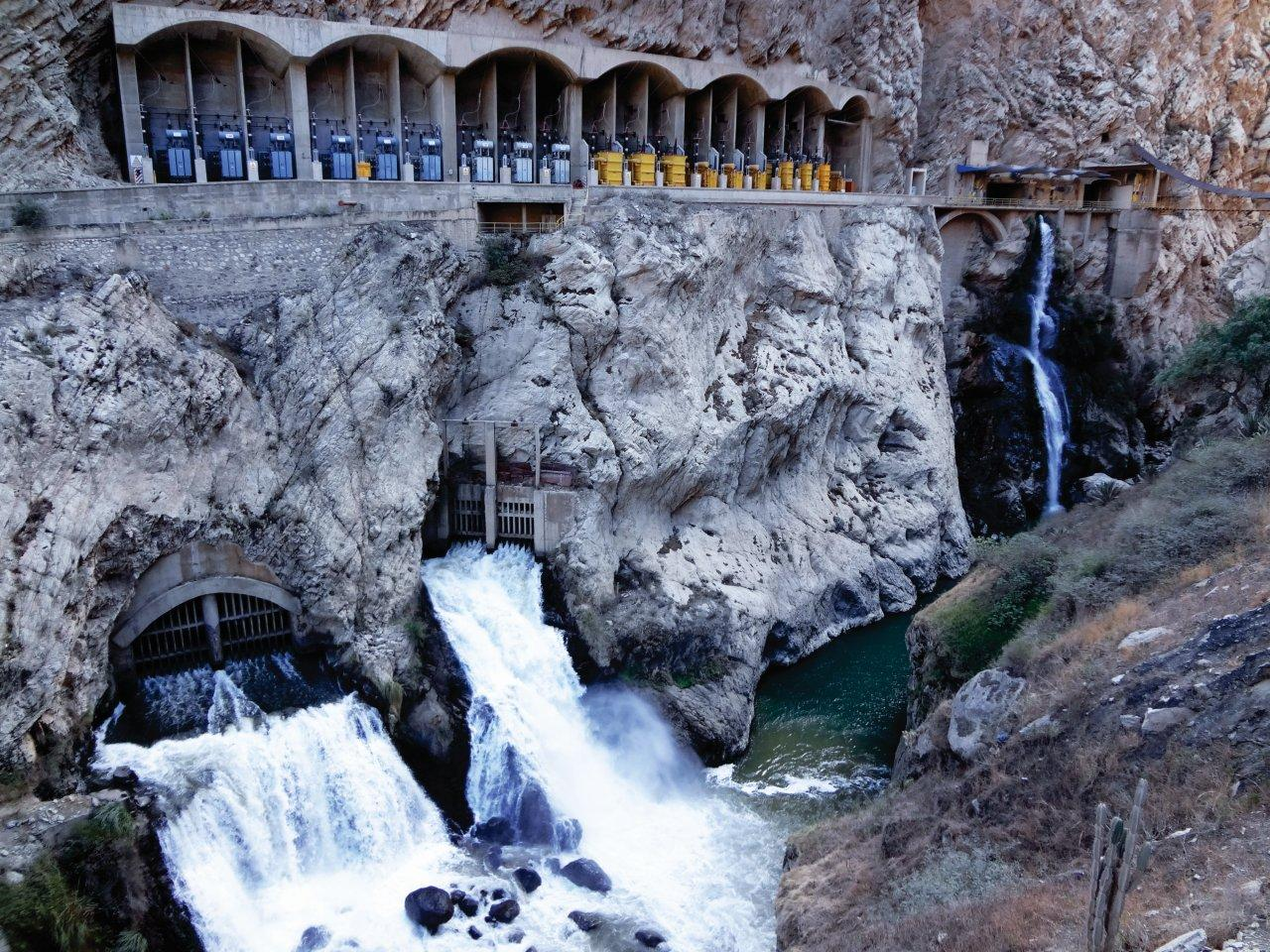 Vista de la central hidroeléctrica Cañón del Pato